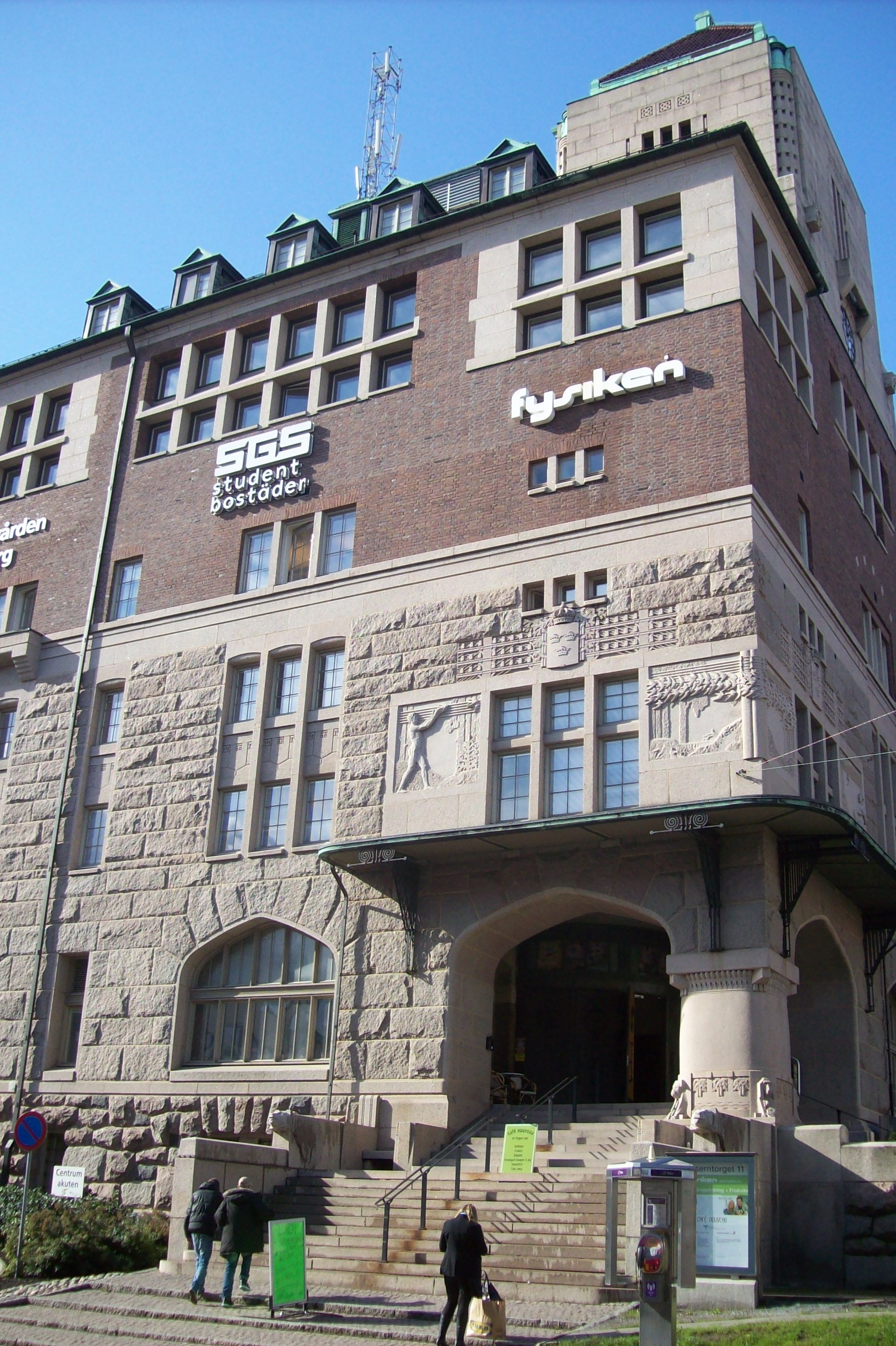 TELEVERKETS HUS, Inom Vallgraven 36:4 (f.d. Telegrafen 2), GÖTEBORG